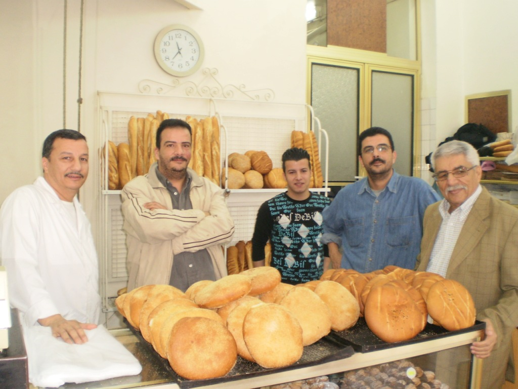 Une des rares familles à Blida assumant encore le noble métier de boulanger.